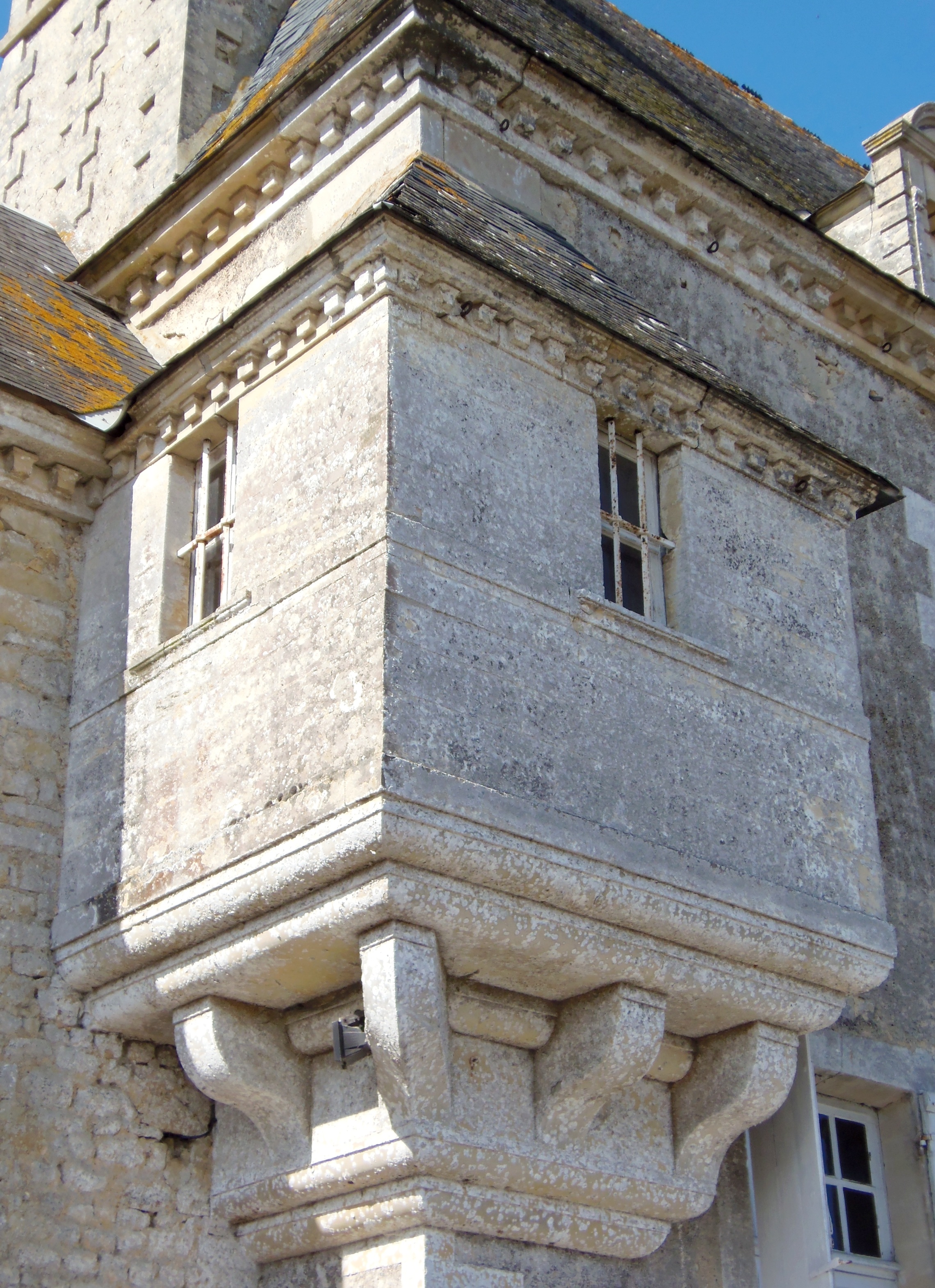 Mandeville-en-Bessin (Normandie, France). Échauguette sur le manoir de Douville.